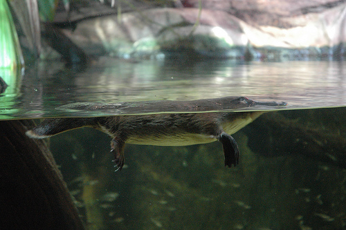 Ornithorhynchus anatinus no Aquário de Sydney